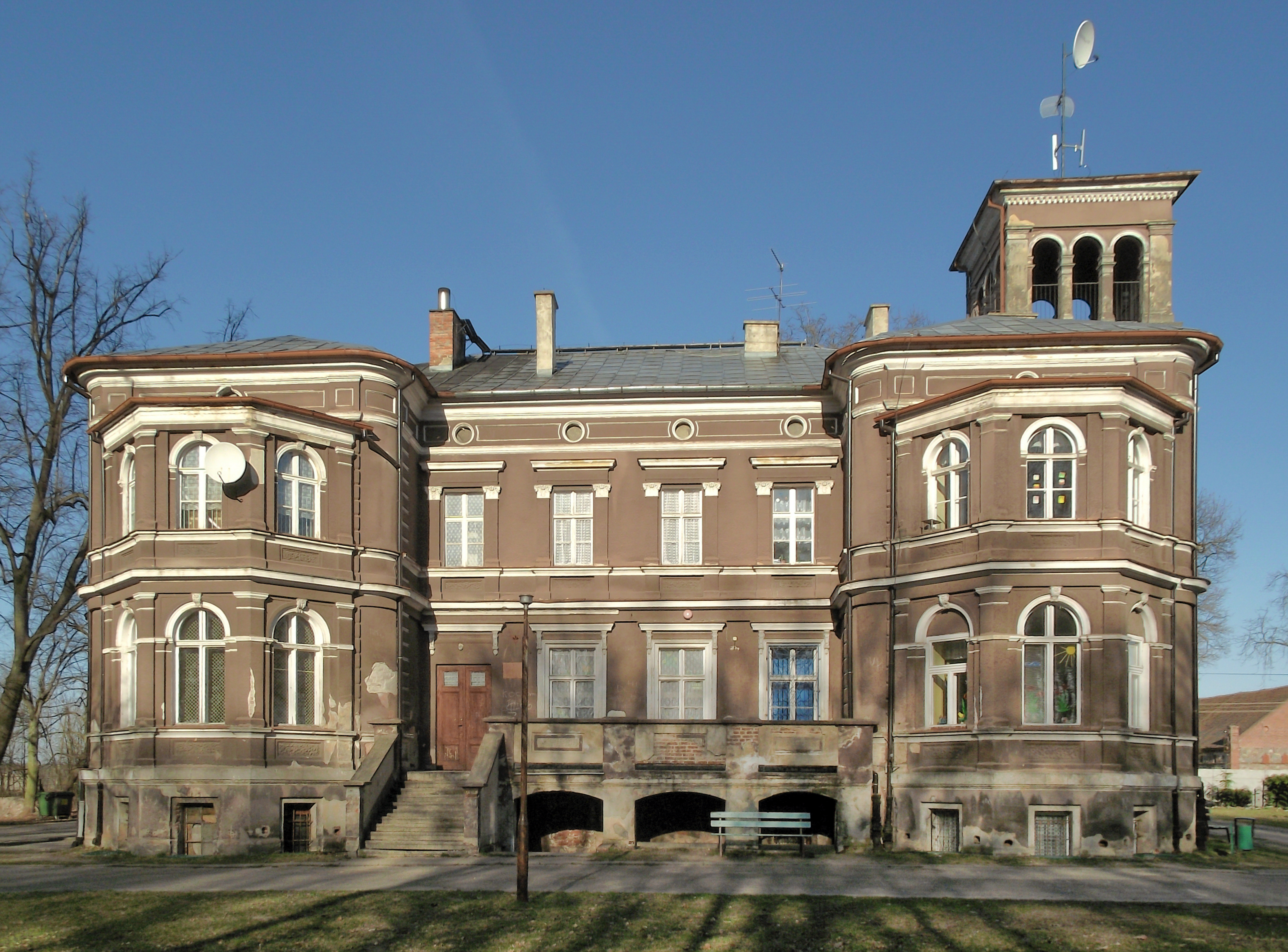 Pałac w Bukowie z 1 poł. XIX w., obecnie szkoła podstawowa (zabytek nr rejestr. 3174).